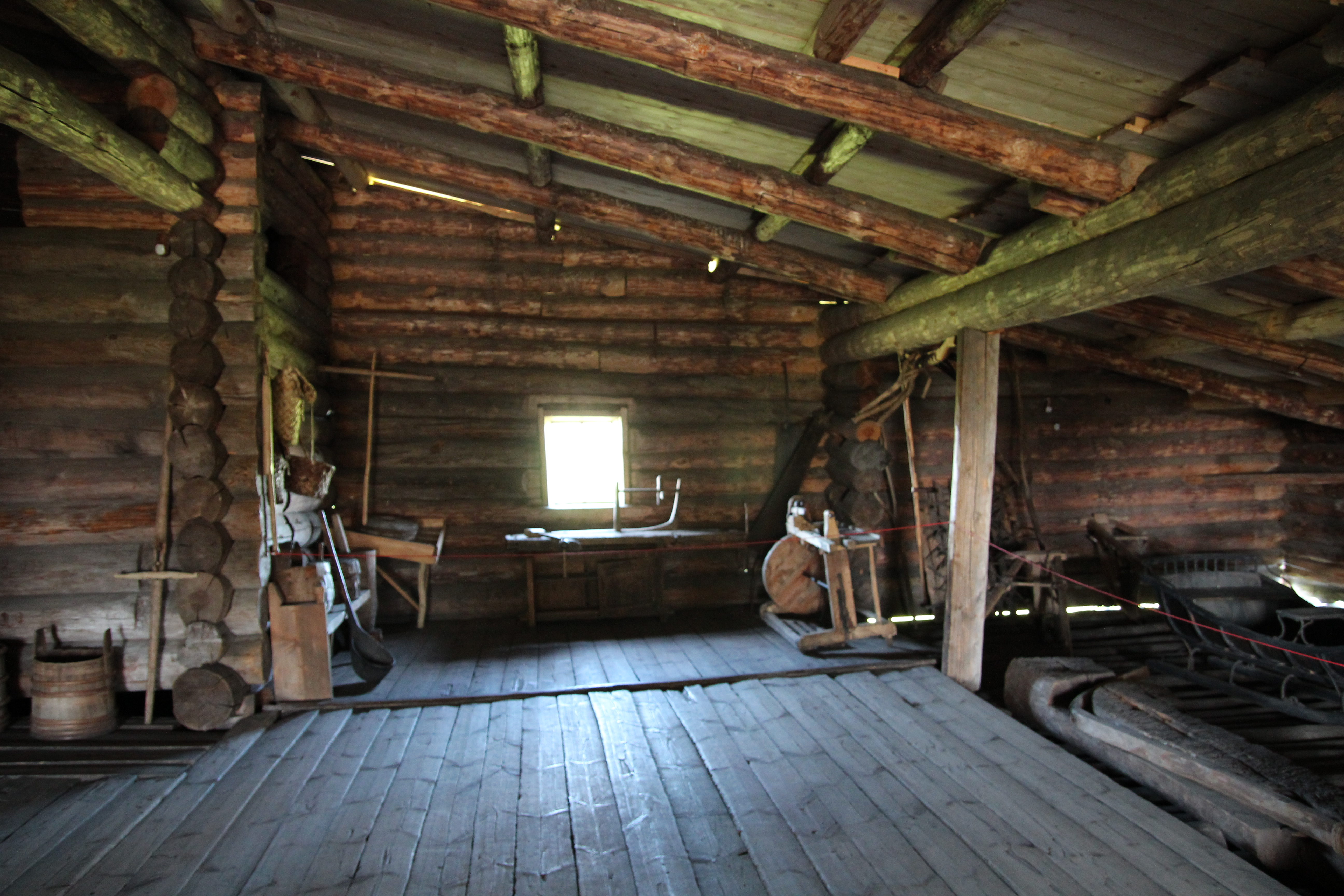 В доме Ошевнева